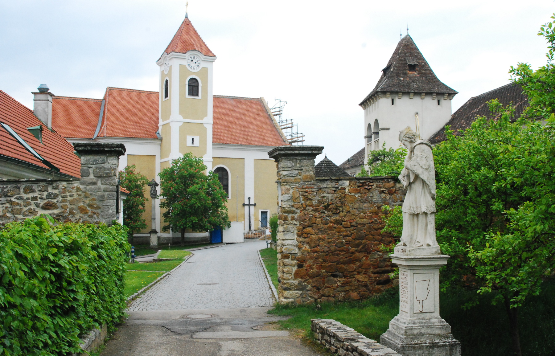 Johannes-Nepomuk-Statue am Quittengang in Maissau in Niederösterreich. Im Hintergrund die Pfarrkirche